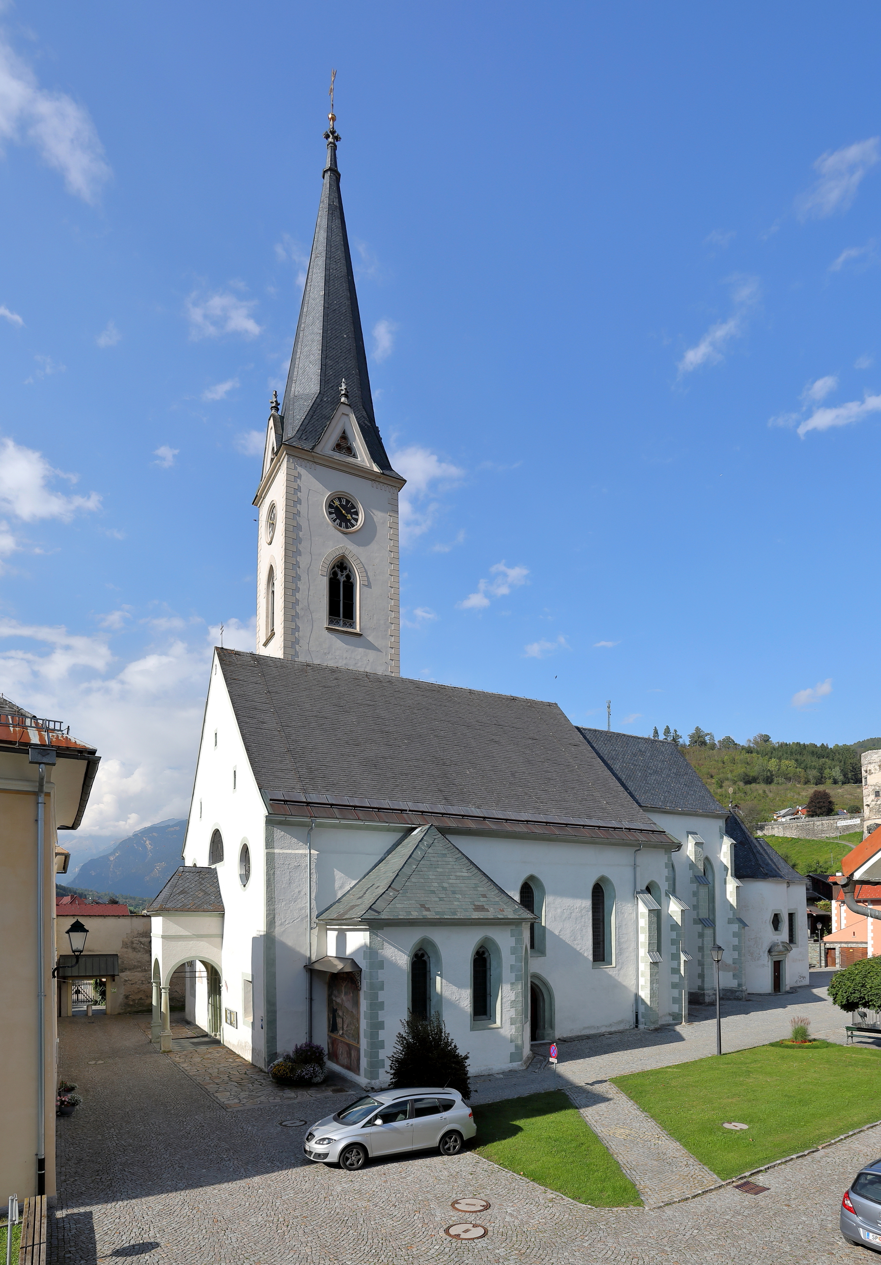 Die röm.-kath. Pfarrkirche Mariä Himmelfahrt der Gemeinde Gmünd in Kärnten.Ein gotischer Sakralbau, der 1339 geweiht wurde. Nach 1459 wurde die Rosenhaimer-Kapelle (heute Taufkapelle) angebaut und 1641/42 die Raitenau-Kapelle (heute Aufbahrungshalle). 1886/87 wurde der Turm über gotischen Fundamenten neu errichtet.